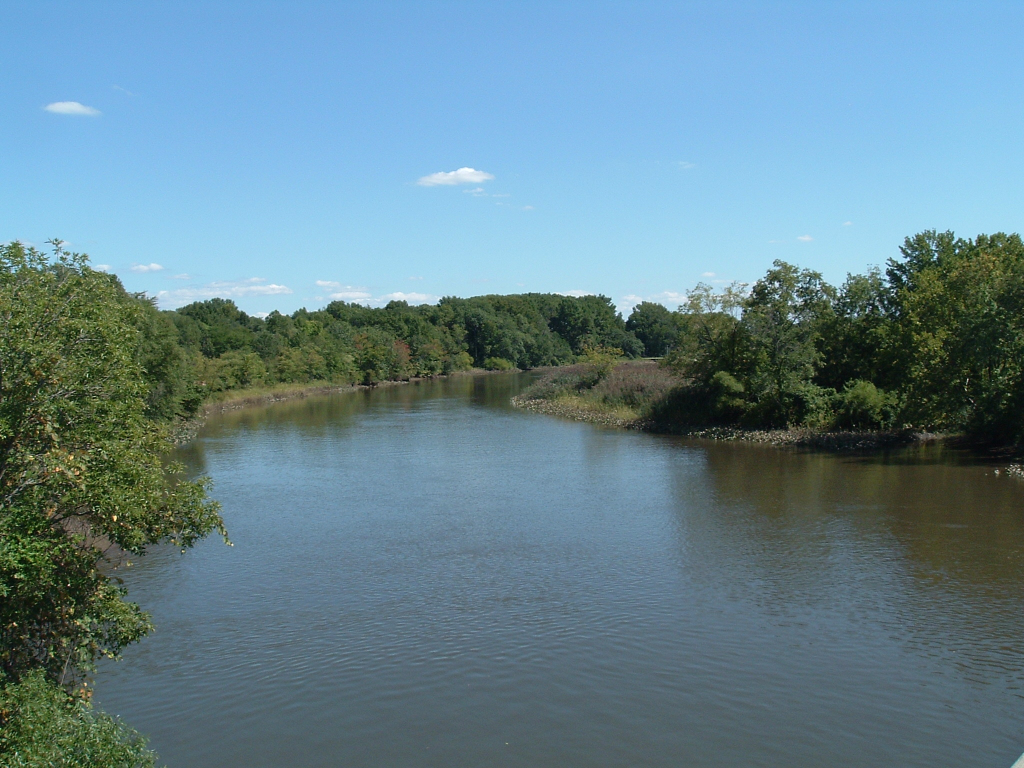 Big Timber Creek, main stem, Bellmawr, Camden County, New Jersey